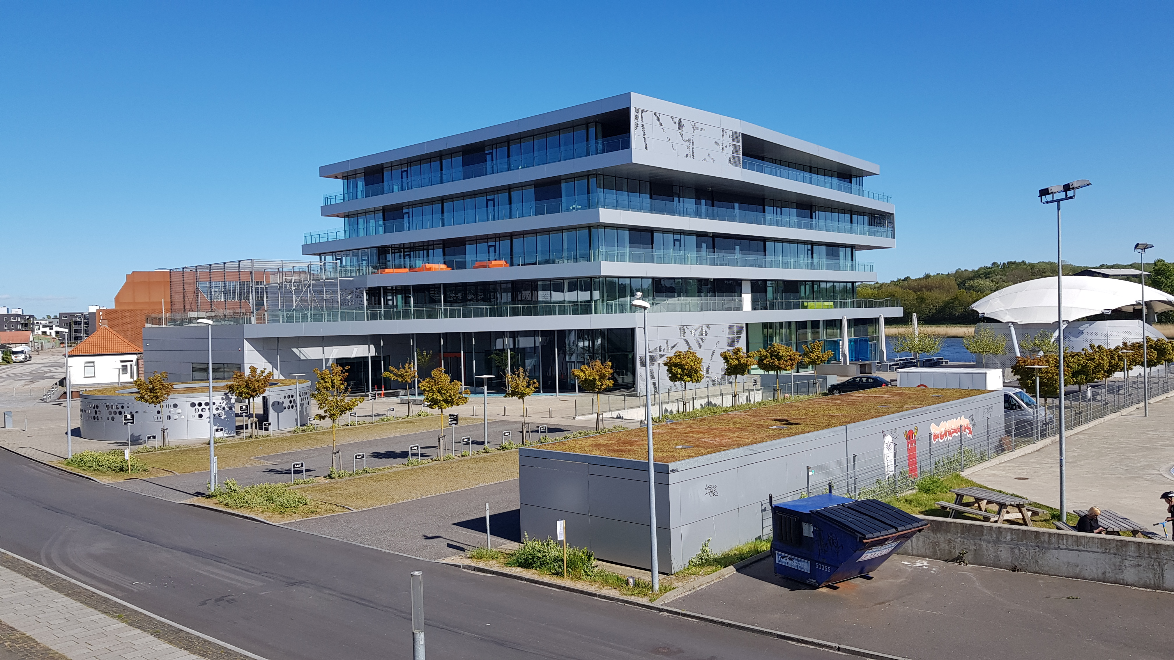 VUCs bygning i Haderslev